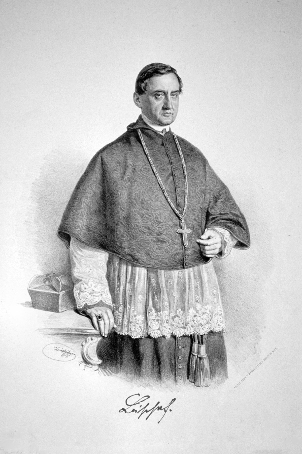 Vinzenz Gasser (1809-1879), Bischof von Brixen, Gründer des Vinzentinums (Brixen) Lithographie von Josef Kriehuber, 1856